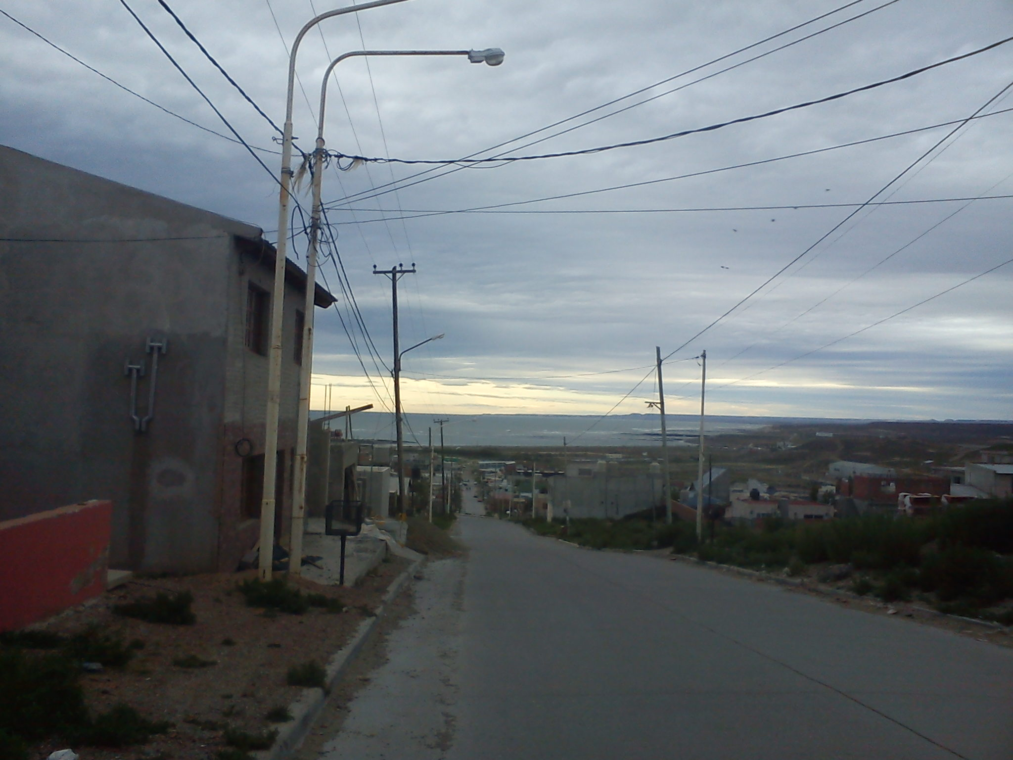 Calle Principal en el Barrio Vista Hermosa II